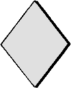 Forme de blason demoiselle